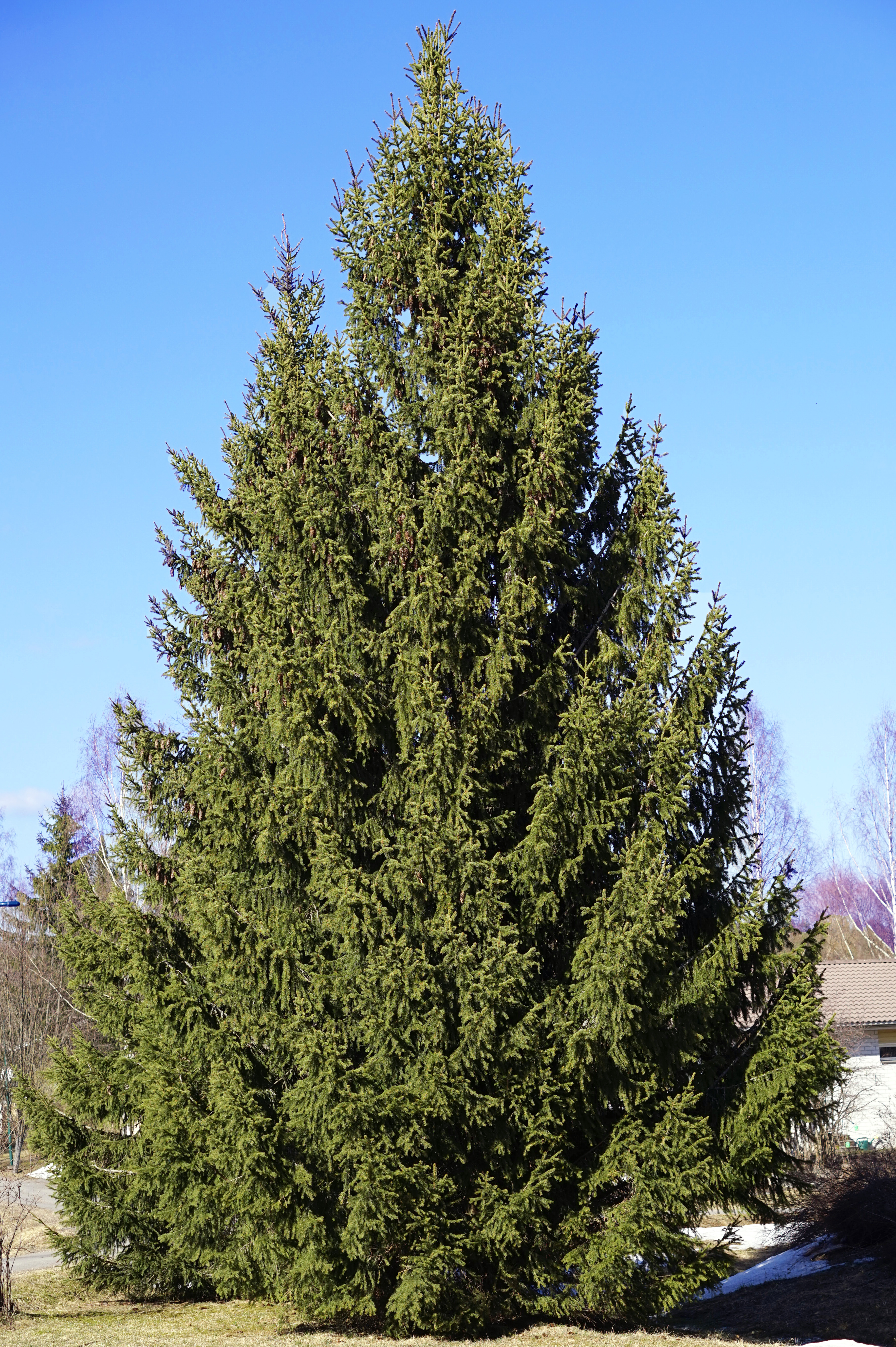 Kuusi Muuramessa.